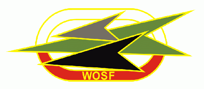 Wojskowa Odznaka Sprawności Fizycznej – 2012, 2019; Polska.